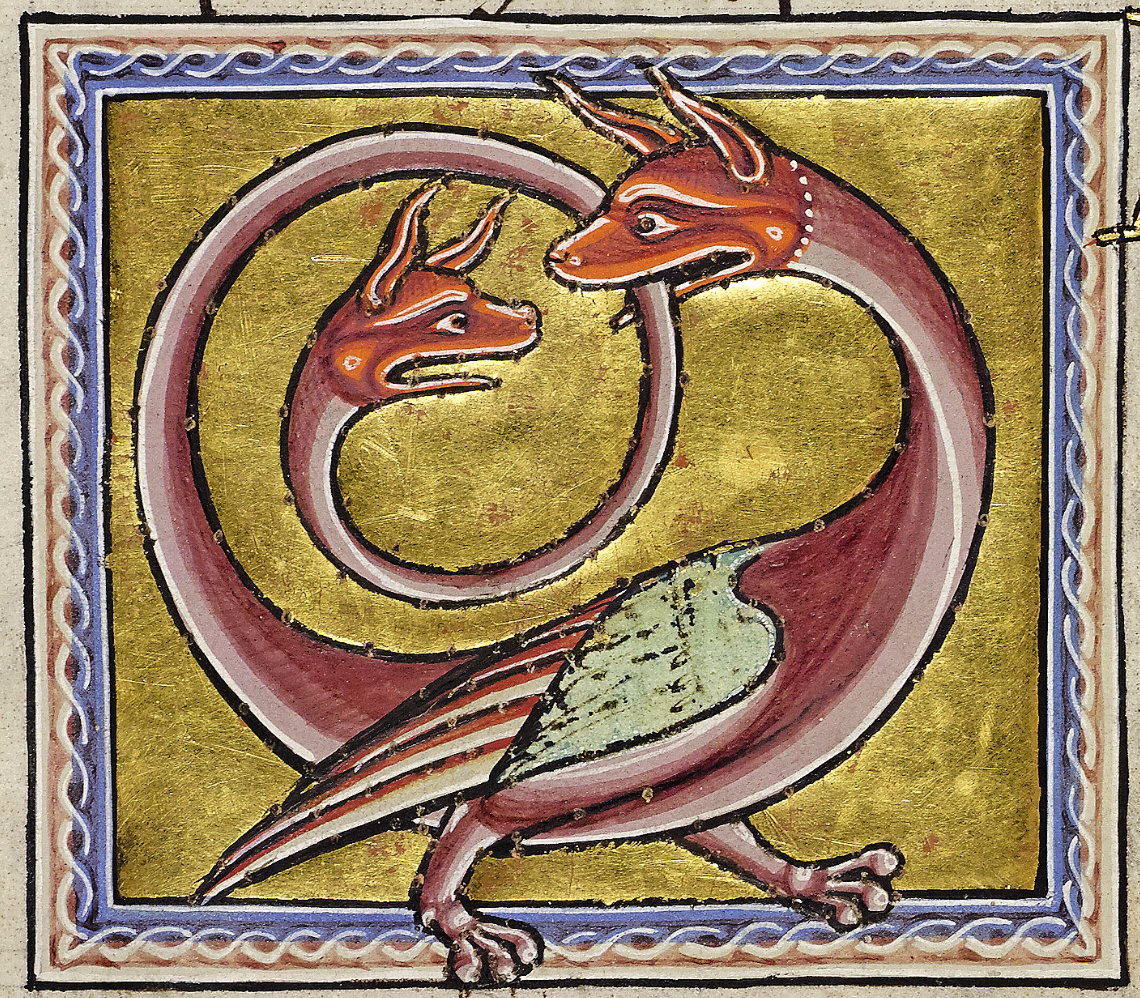 FOLIO-68V. На средней миниатюре можно увидеть амфисбену, имеющую две головы.